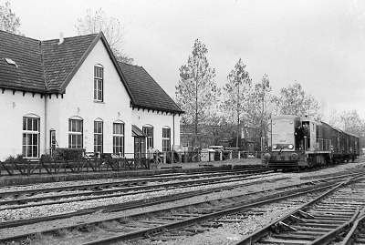 Bahnhof Stiens